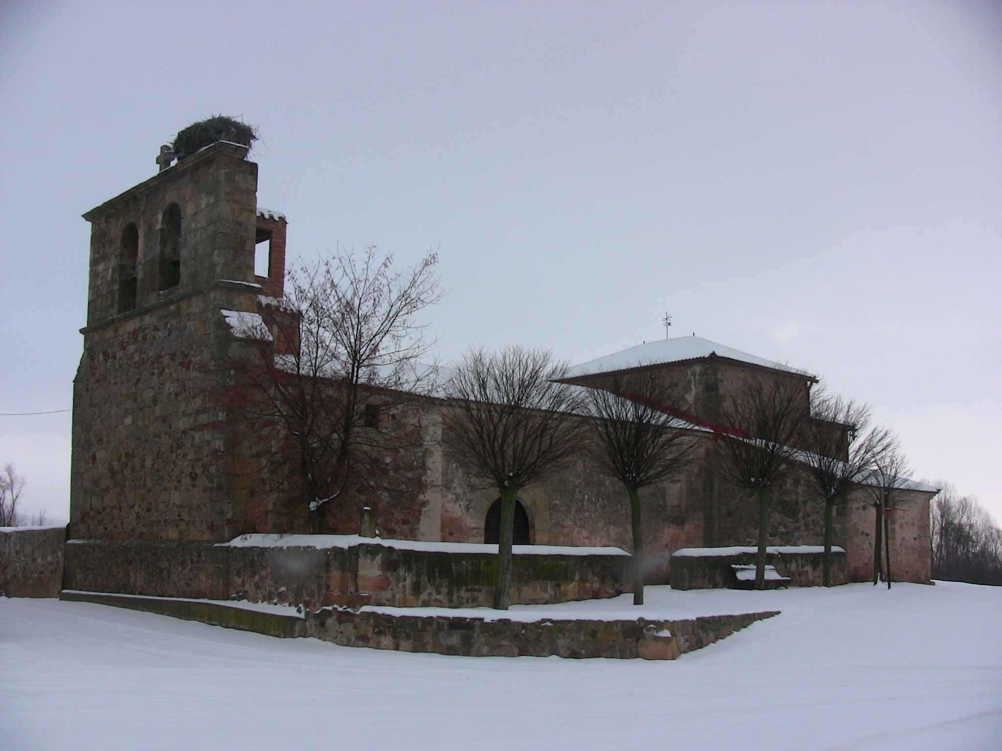 PLAZA DE TARDESILLAS Y LA IGLESIAS TRAS UNA NEVADA EN EL SIGLO PASADO